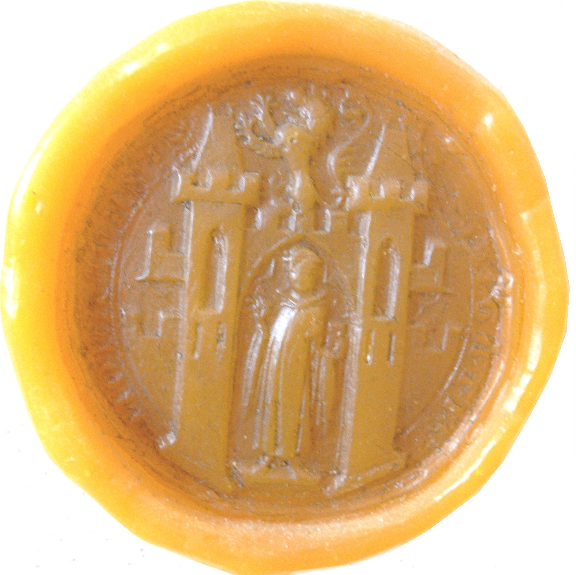 Stadtsiegel von München 1330. Umschrift:"S. Civitatis Monacensis".